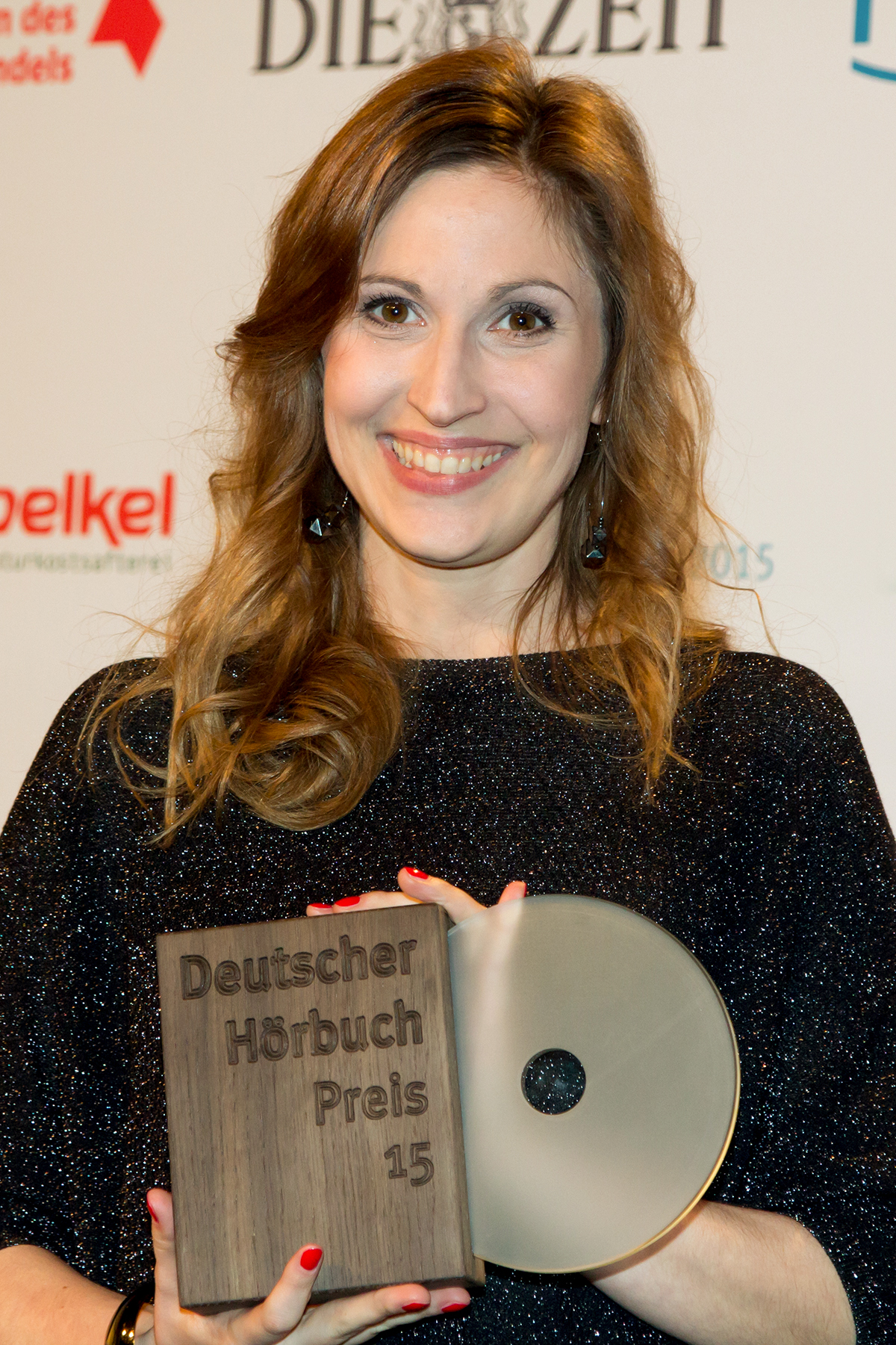 Deutscher Hörbuchpreis 2015, Maria Koschny Preis für beste Interpretin